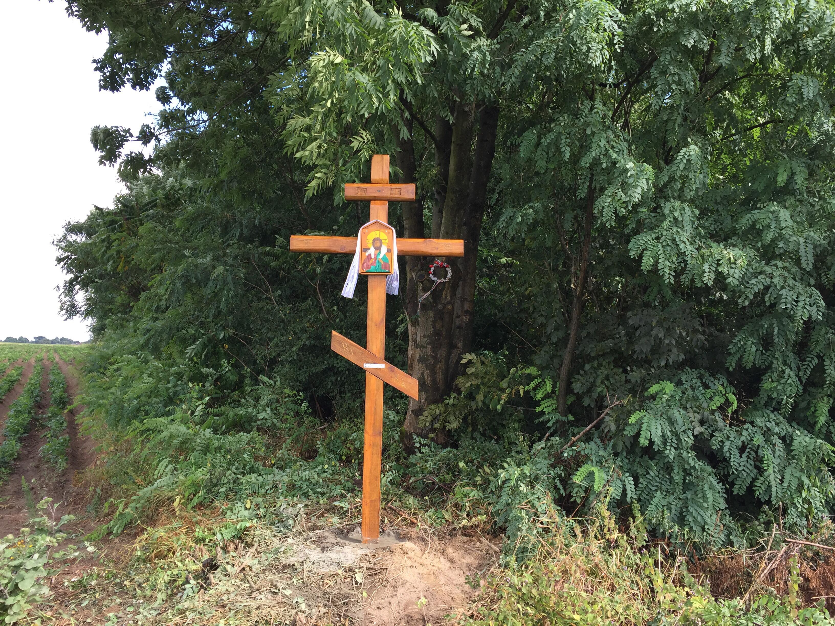 Krzyż postawiony w 2018 r. przez mieszkańców gminy